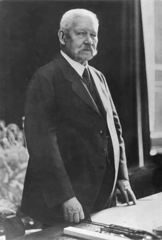 Paul von Hindenburg 28691-32